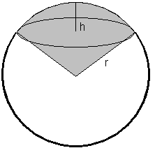 Kugelausschnitt